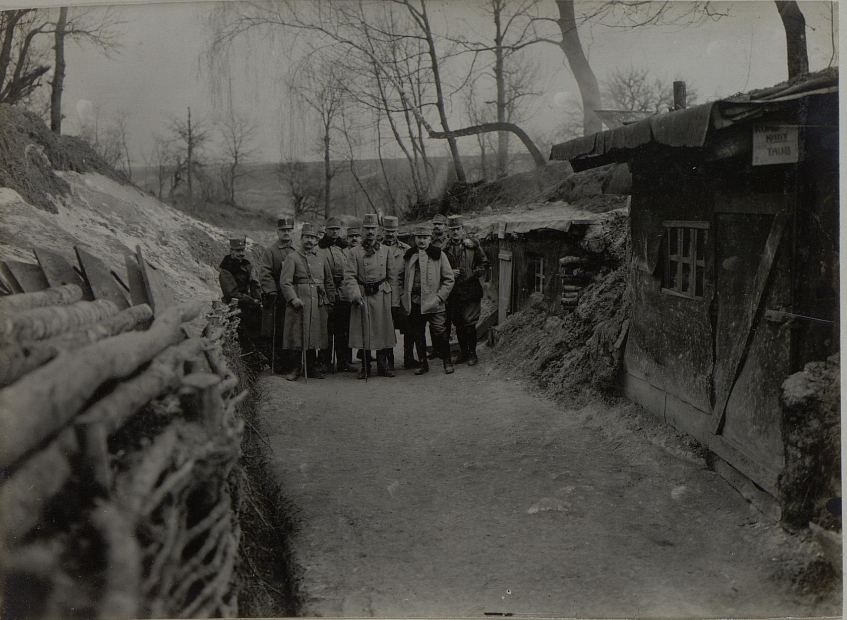 Ankunft Sr.Exzl. des Armeekommandanten BöHM-Ermolli. Aufgenommen in Lopuszno am 31. Jänner 1916.